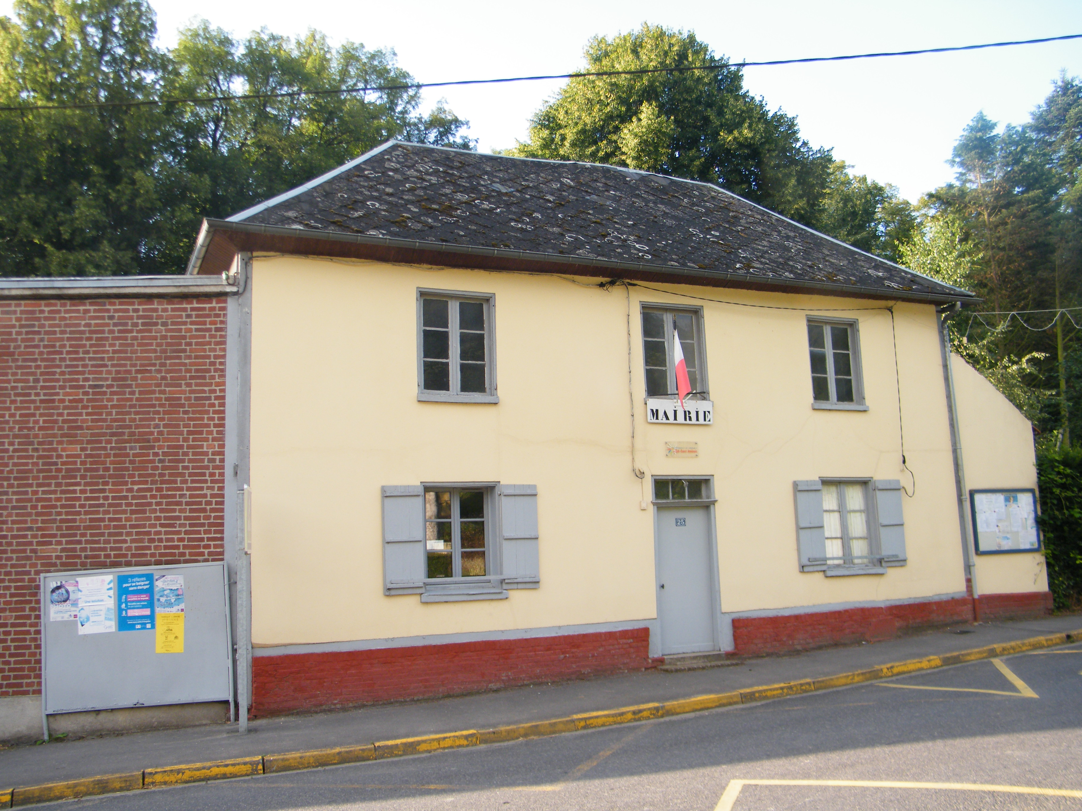 Mairie.